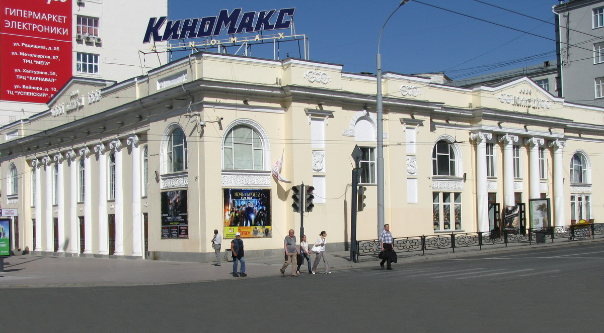 Кинотеатр «Колизей», с 1920 по 2002 назывался «Октябрь», до 1912 года в этом здании располагался первый городской театр. Здание построено в 1847 году.